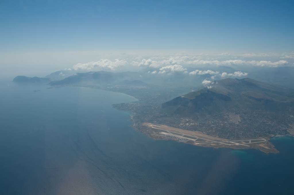 Aeroporto di Palermo-Punta Raisi